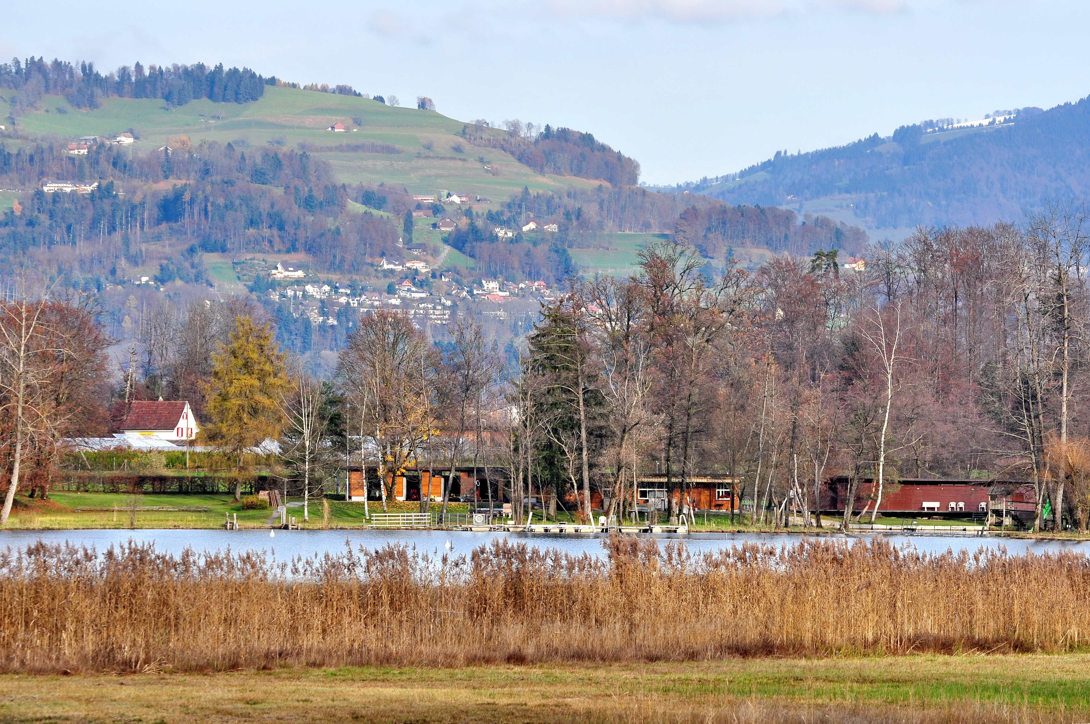 Egelsee in Bubikon (Switzerland)